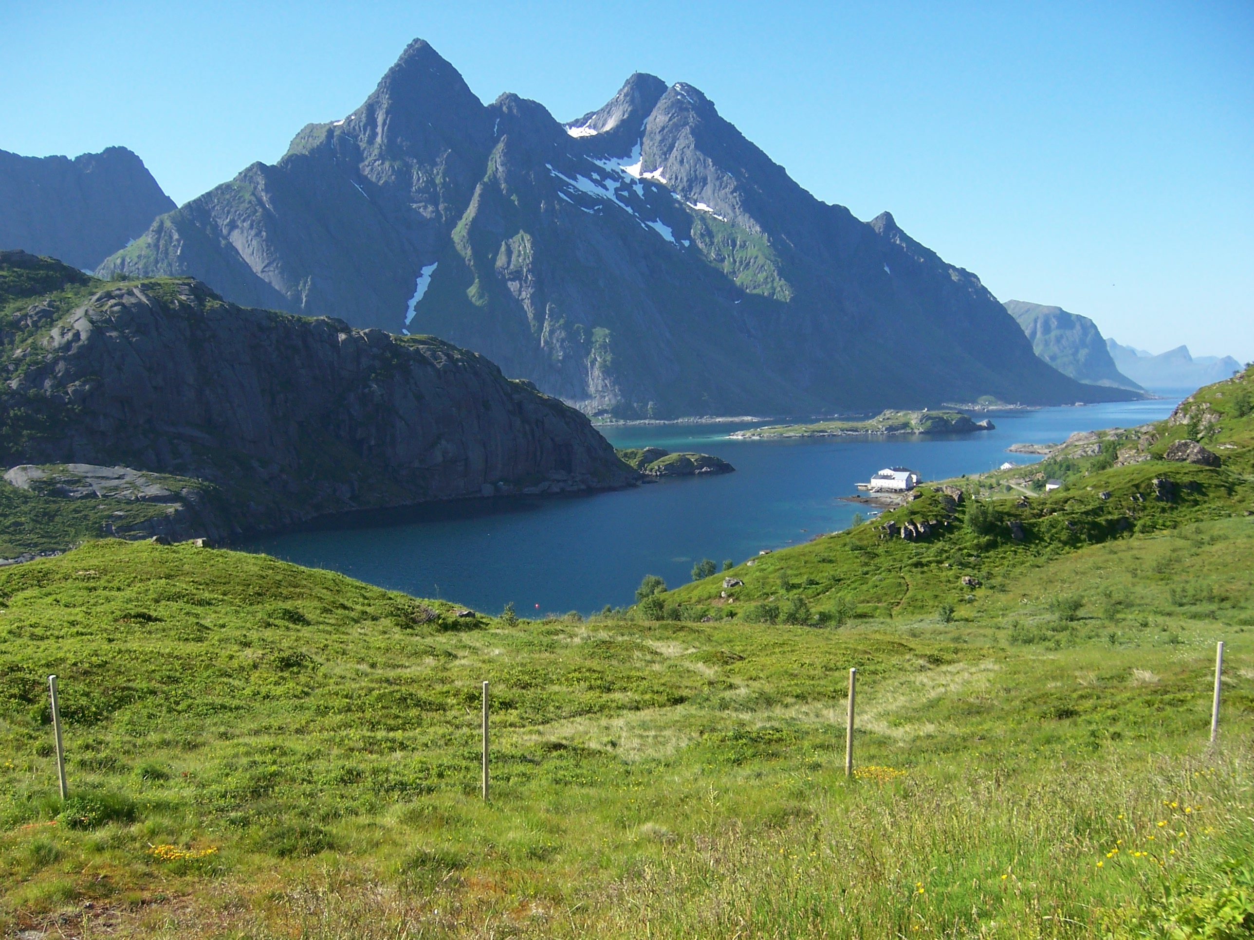 Steinsfjorden near Unnstad on the western side of Vestvågøy in Lofoten